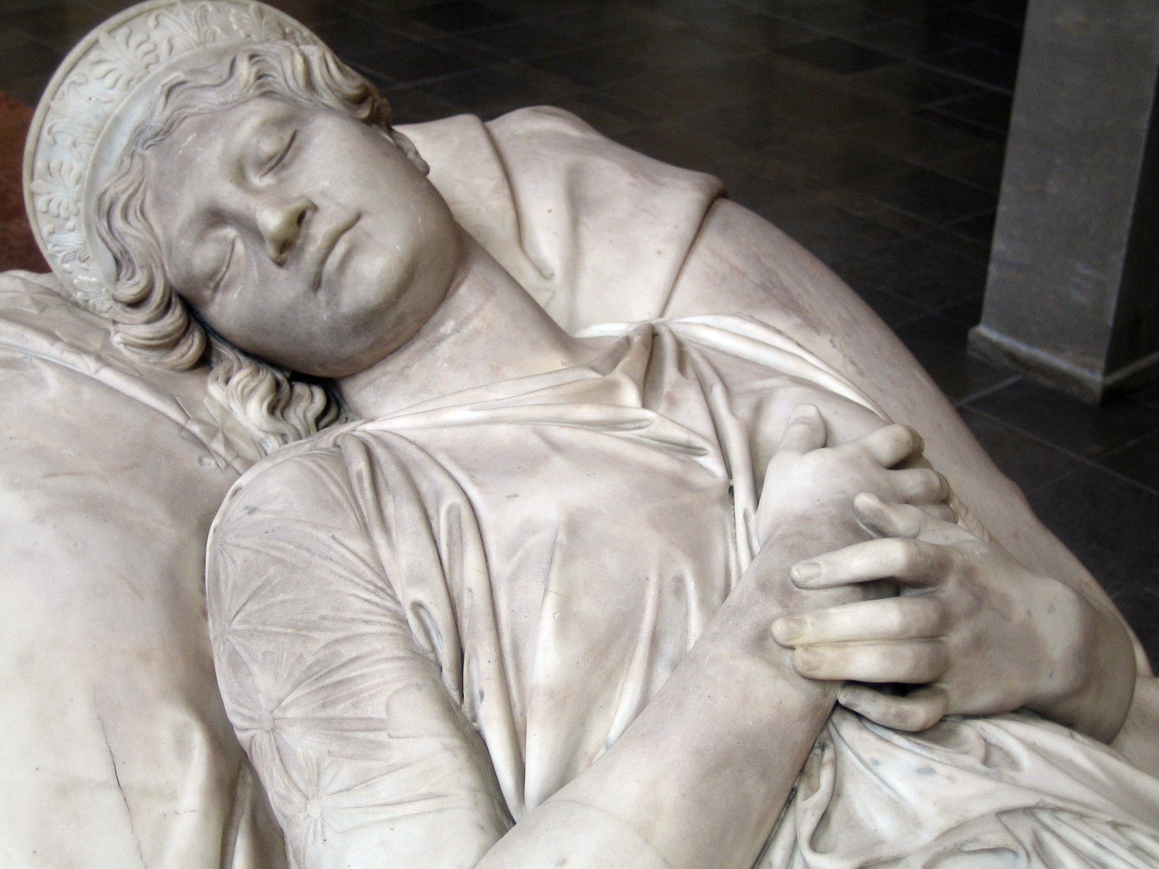 Sarkophag der Königin Luise von Preußen. Skulptur von Christian Daniel Rauch (1811/1814). Teilansicht.